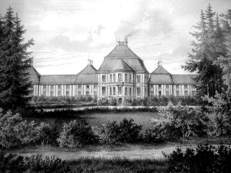 Historische Ansicht von Schloss Faulenrost aus dem 19. Jhd., Reste der Schlossanlage sind bis heute erhalten. Faulenrost, Landkeris Demmin, Mecklenburg-Vorpommern, Deutschland